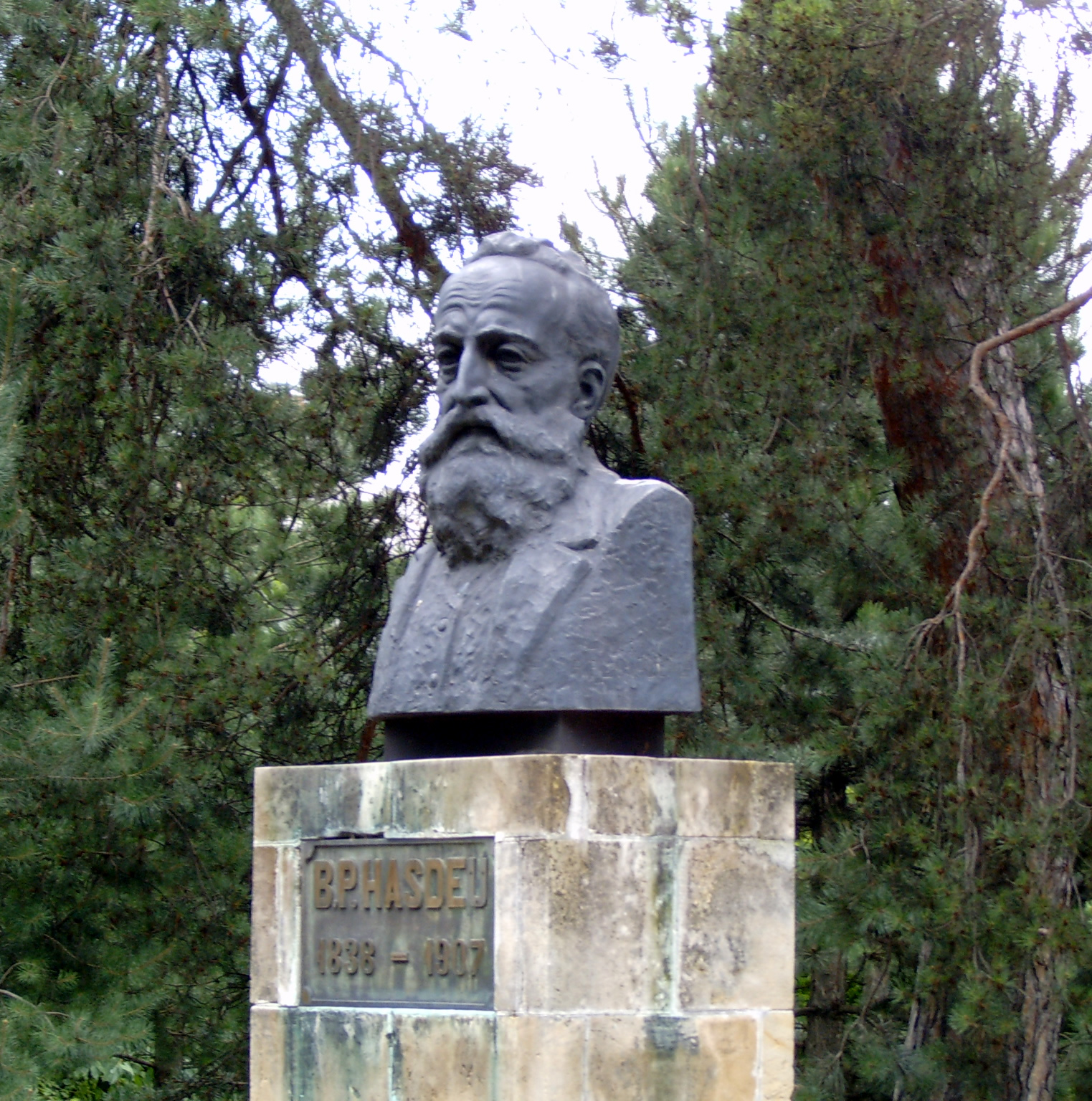 Bust B.P. Hasdeu, in curtea palatului Iulia Hasdeu, Campina 02